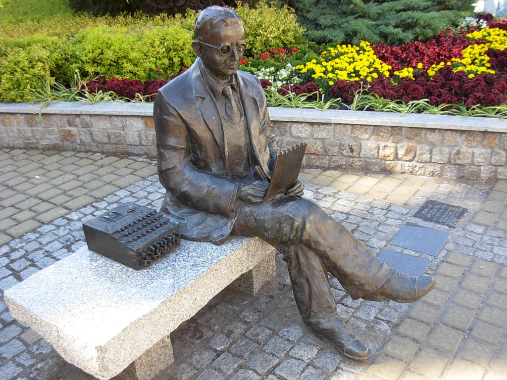 Ławeczka Mariana Rejewskiego w Bydgoszczy